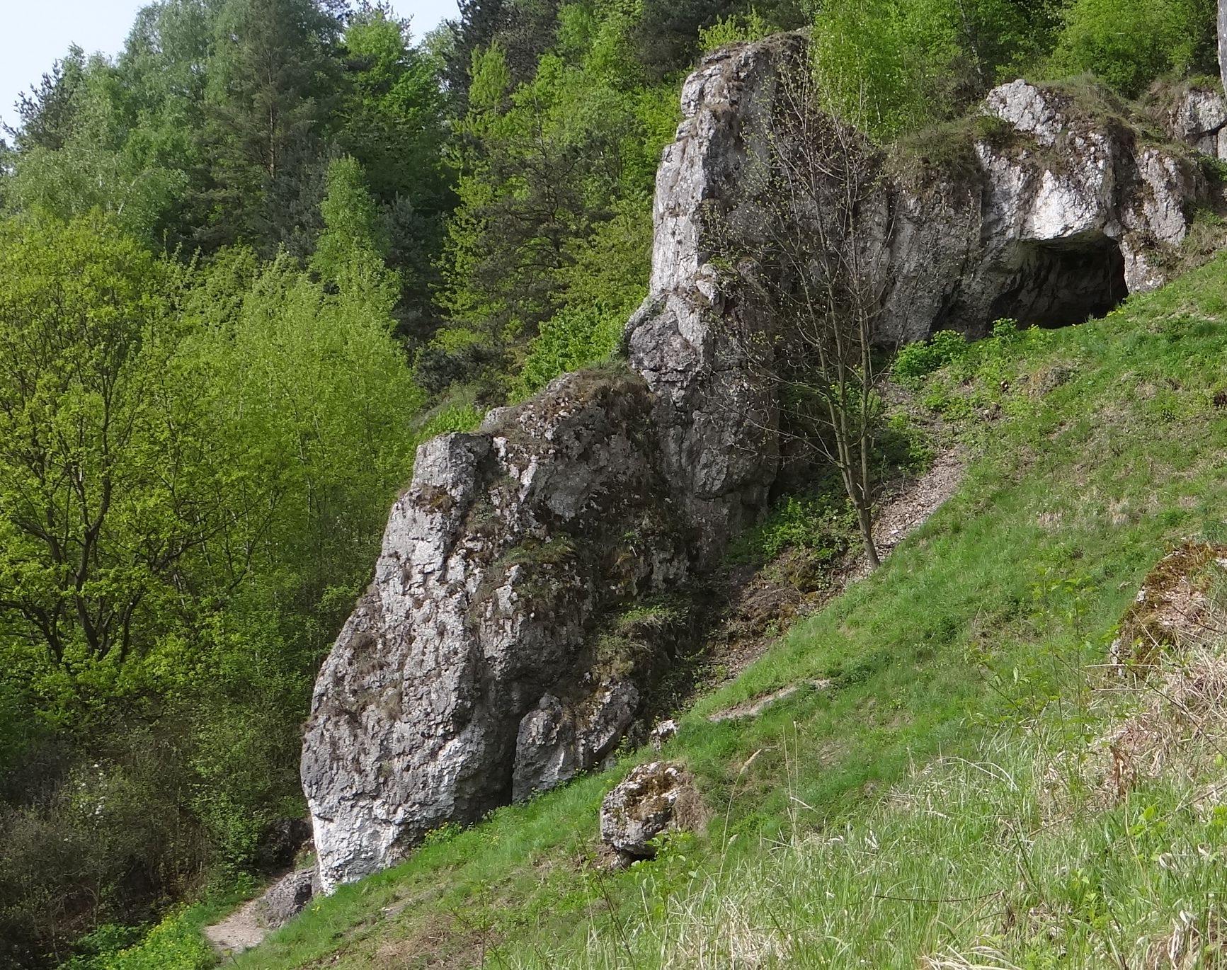 Mała Płyta w Dolinie Kobylańskiej